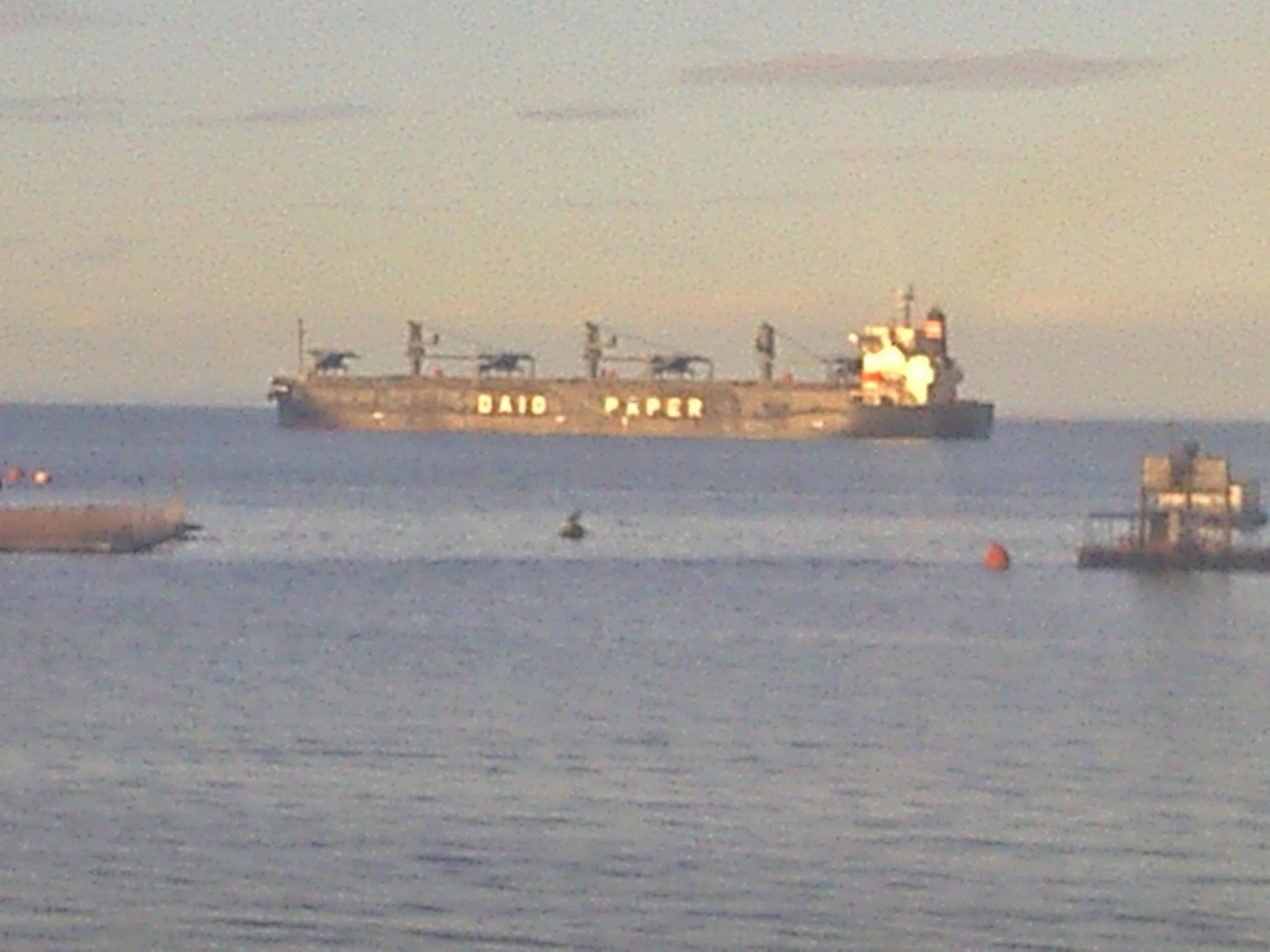 Buque de DAIO PAPERS para transporte de chips de madera zarpardo desde el puerto de Calbuco, Chile.